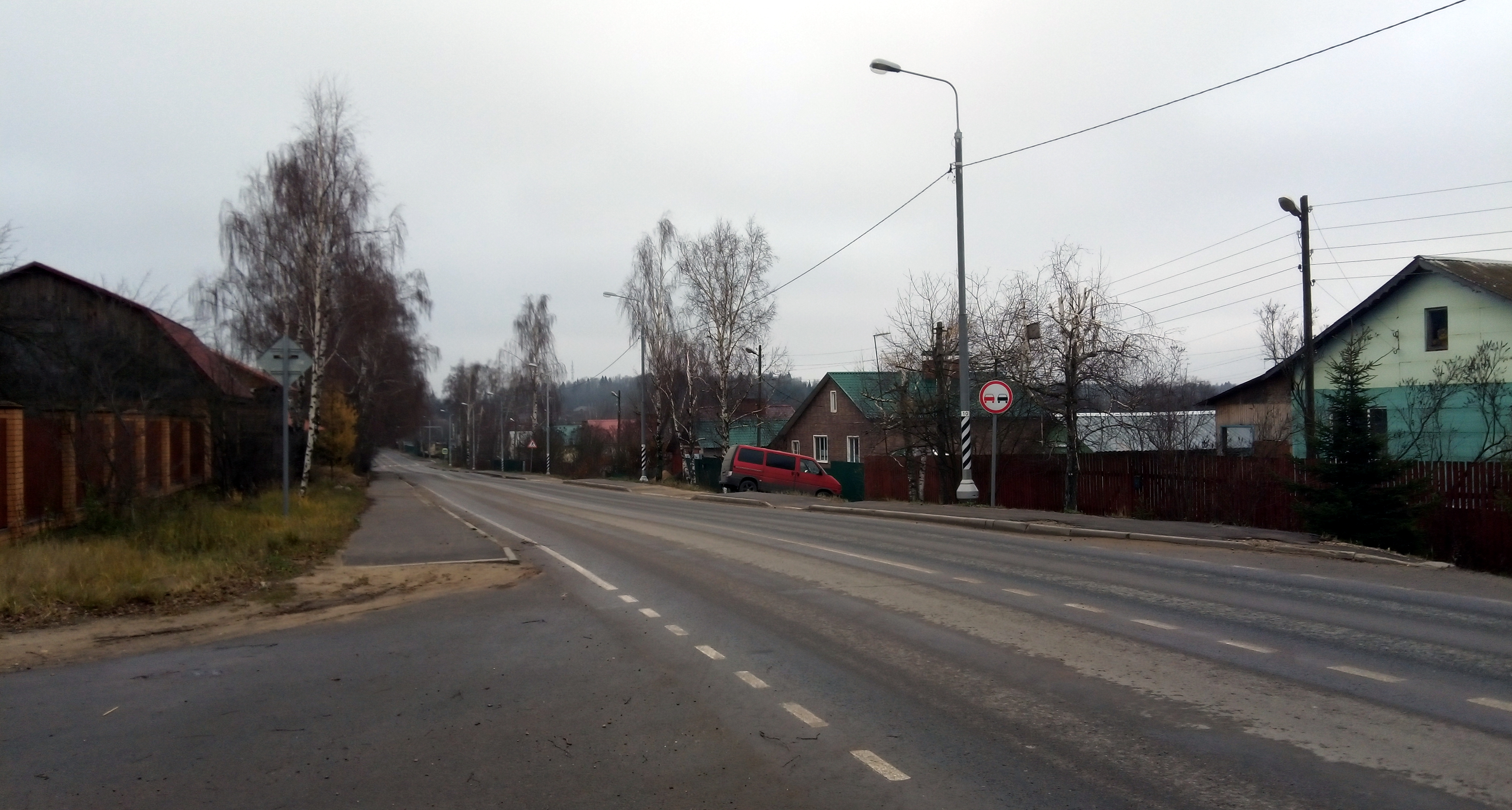 Куотпино.Октябрь 2019.